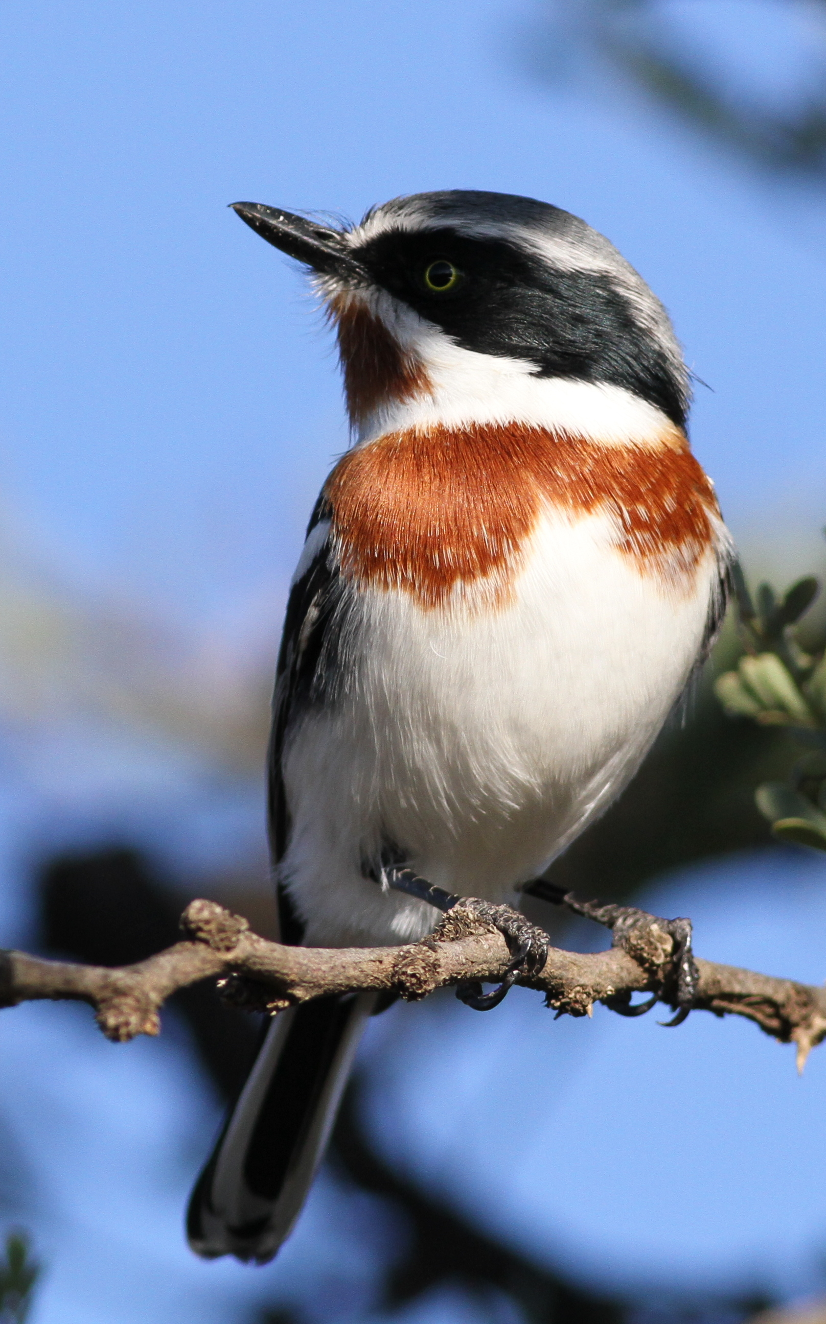 Female